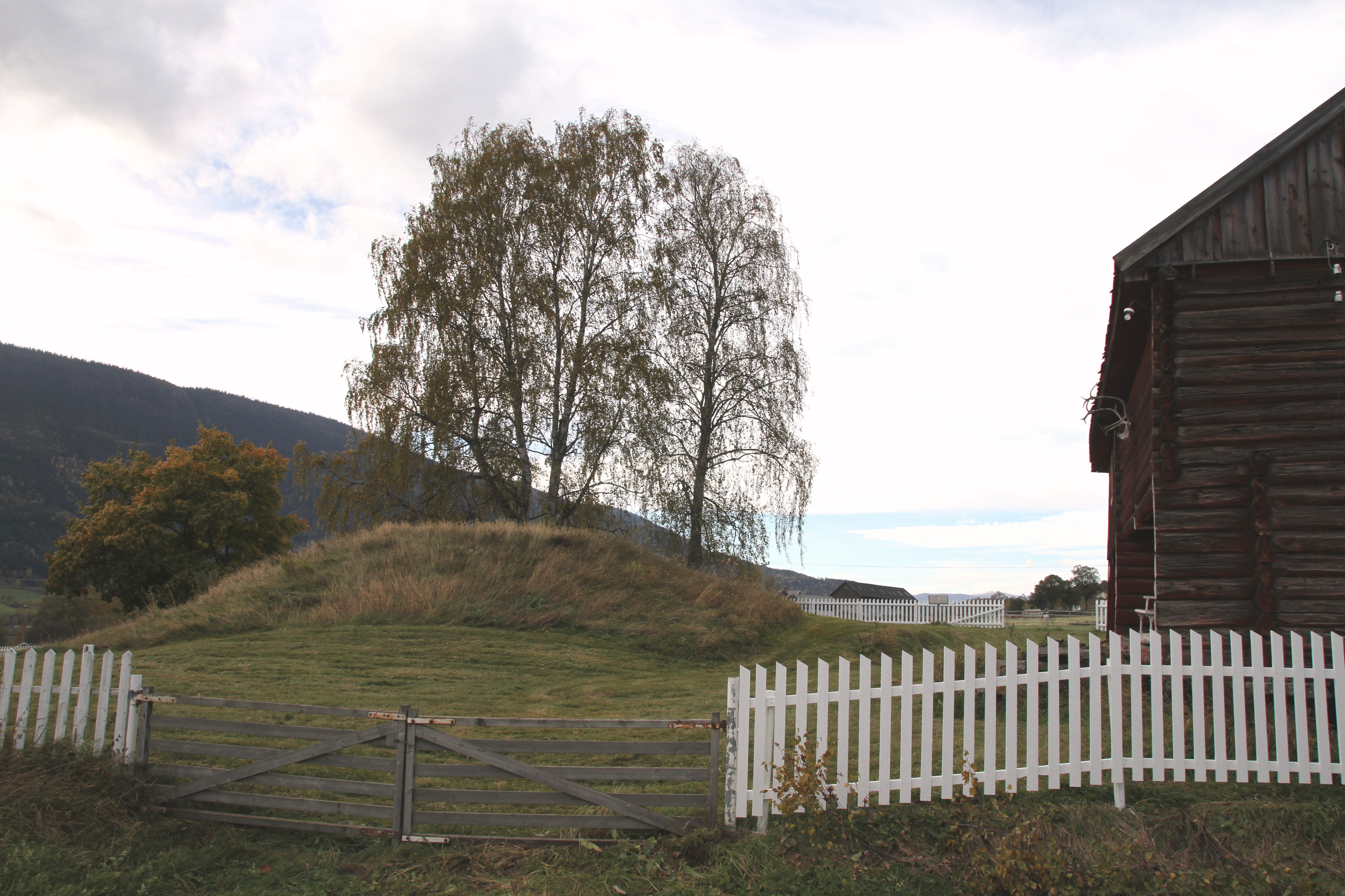 Gården Hundorp, område i nord hvor det er en oldtids gravhaug på gårdsområdet. Sør-Fron i Oppland.